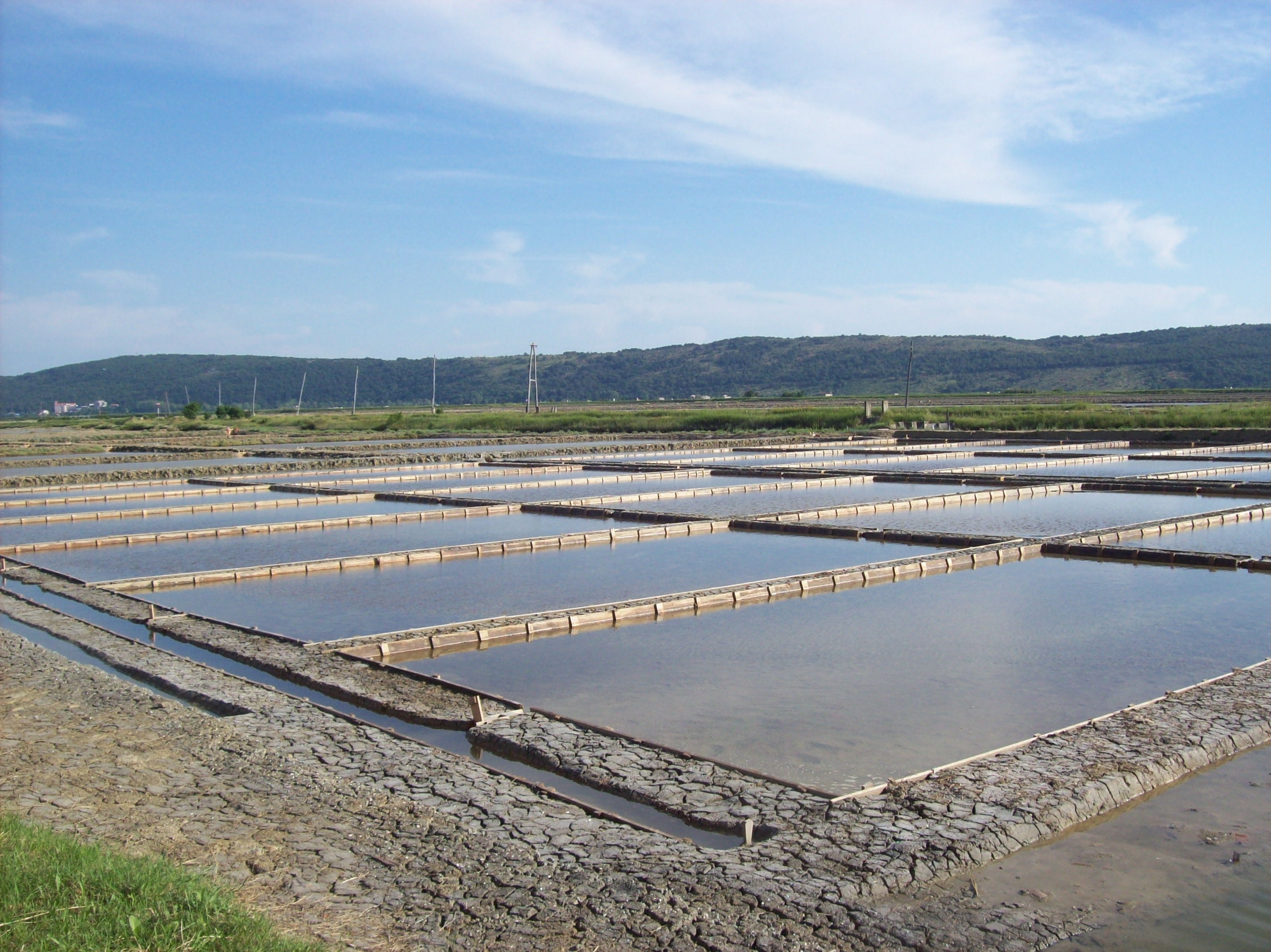 Sečoveljske soline (Slovenija)